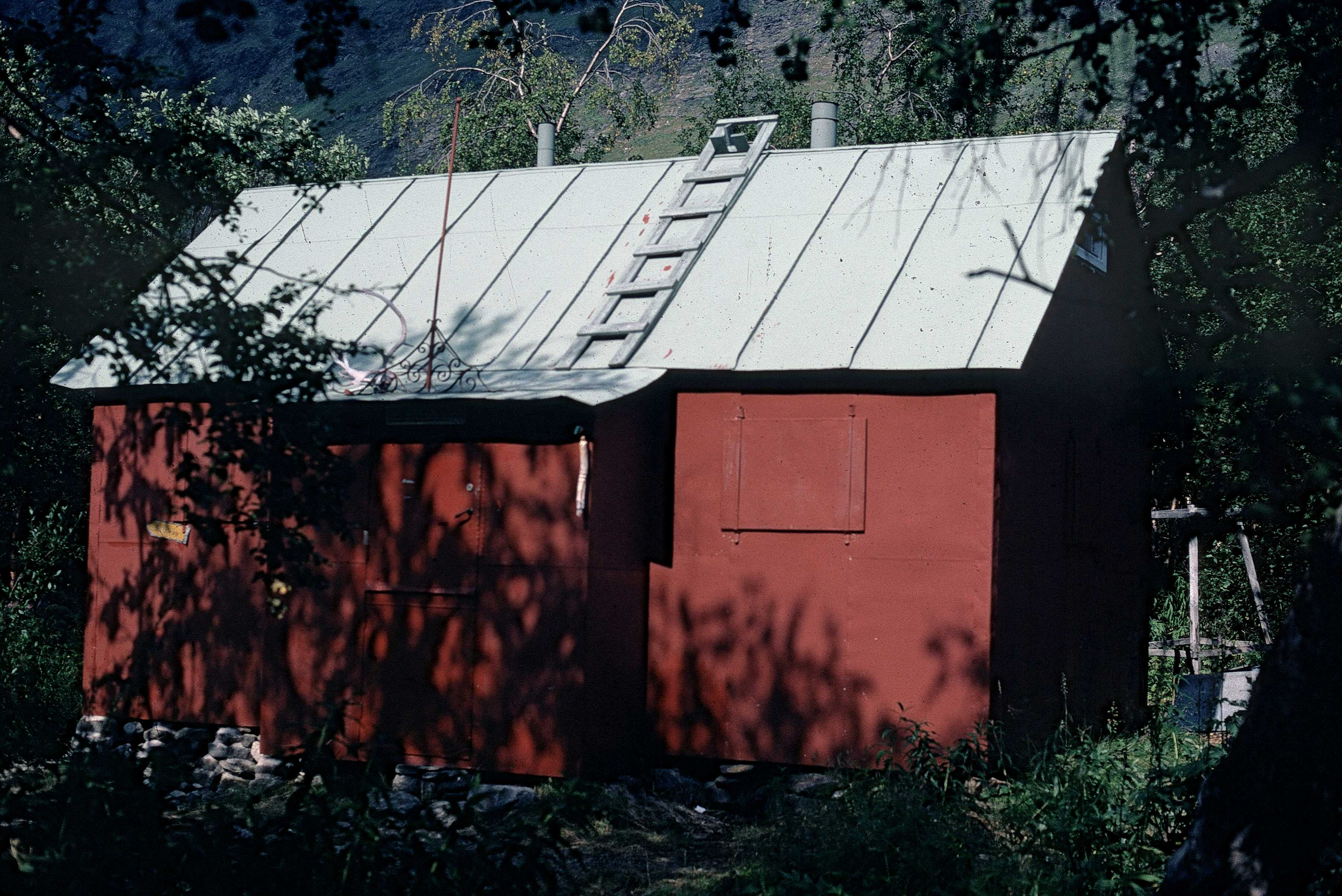 Axel Hambers Skårkistuga